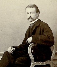 Filip Skrbenský z Hříště (1830 - 1908), Rakouský šlechtic a politik.